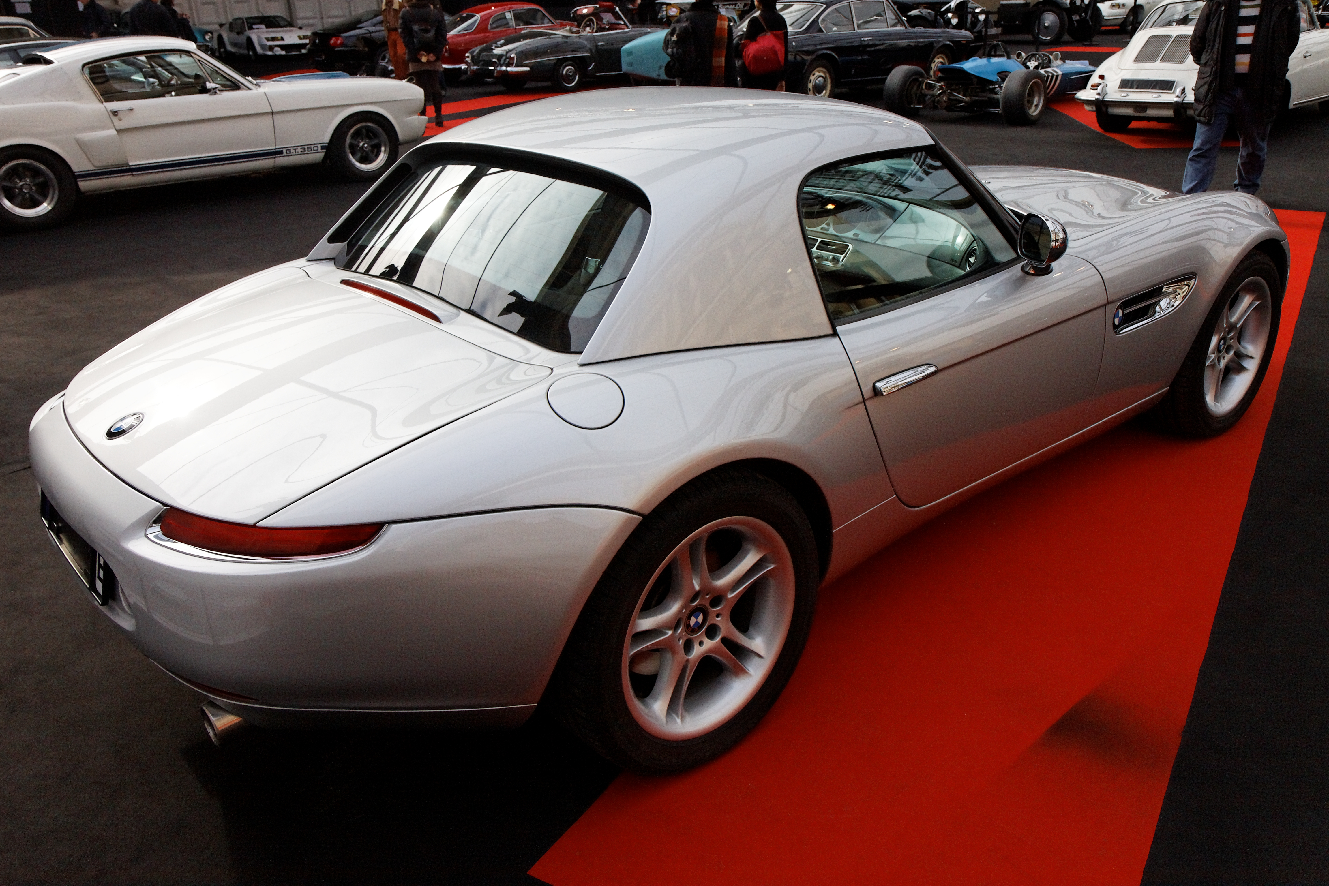 BMW Z8 - Festival Automobile International 2011 - Vente aux enchères